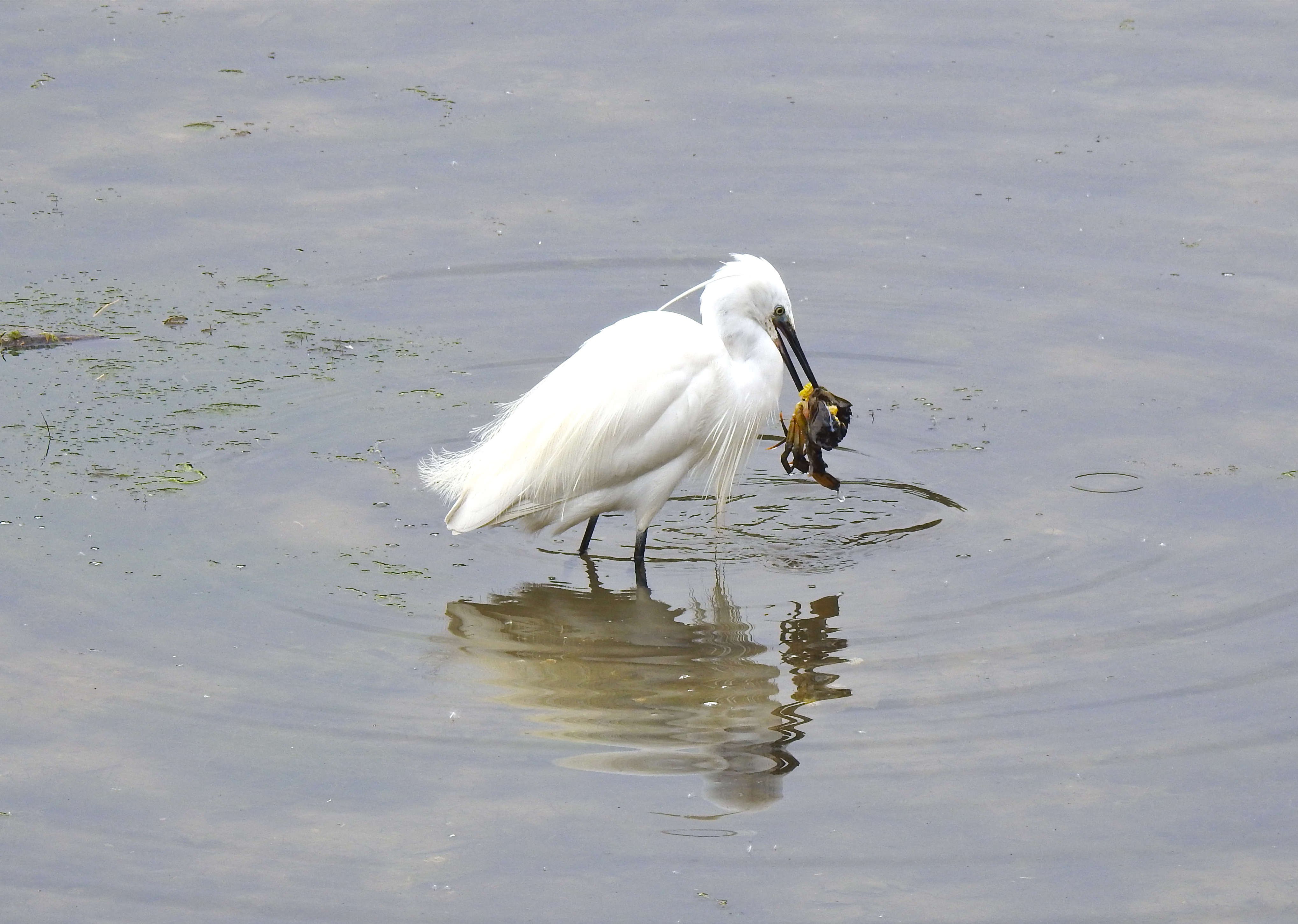 Plaiaundi, Txingudi. Irún This is a photography of a Special Area of Conservation in Spain with the ID: ES2120018. Natura2000 entry, EEA entry